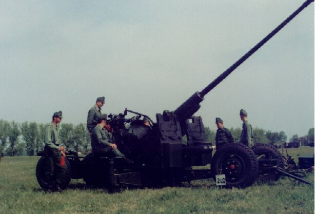 Sz-60-as 57 mm-es könnyű légvédelmi löveg, Nagyoroszi